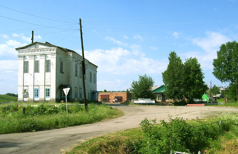 Село Пажга, Сыктывдинский район, Республика Коми